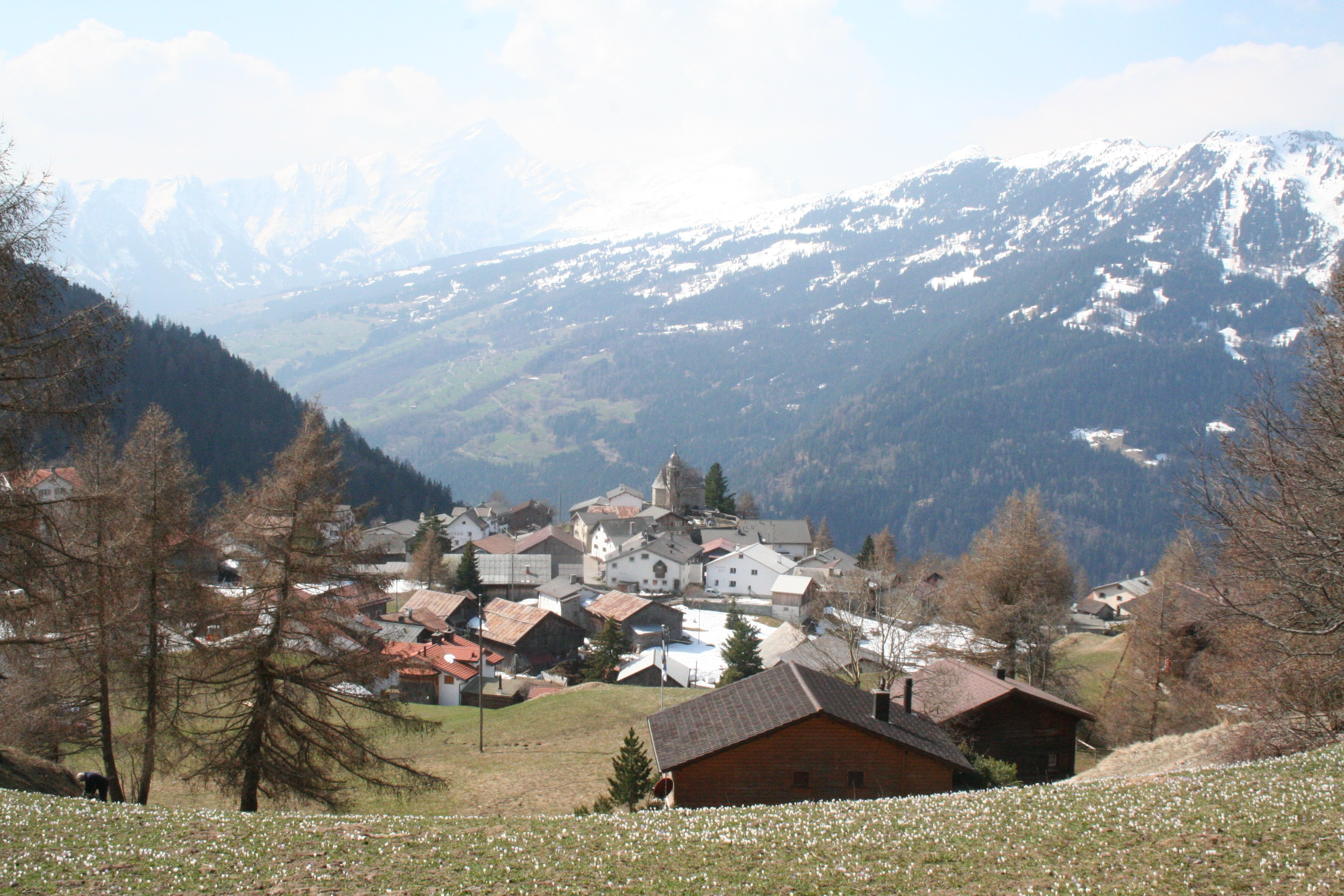 Feldis Richtung Südwesten